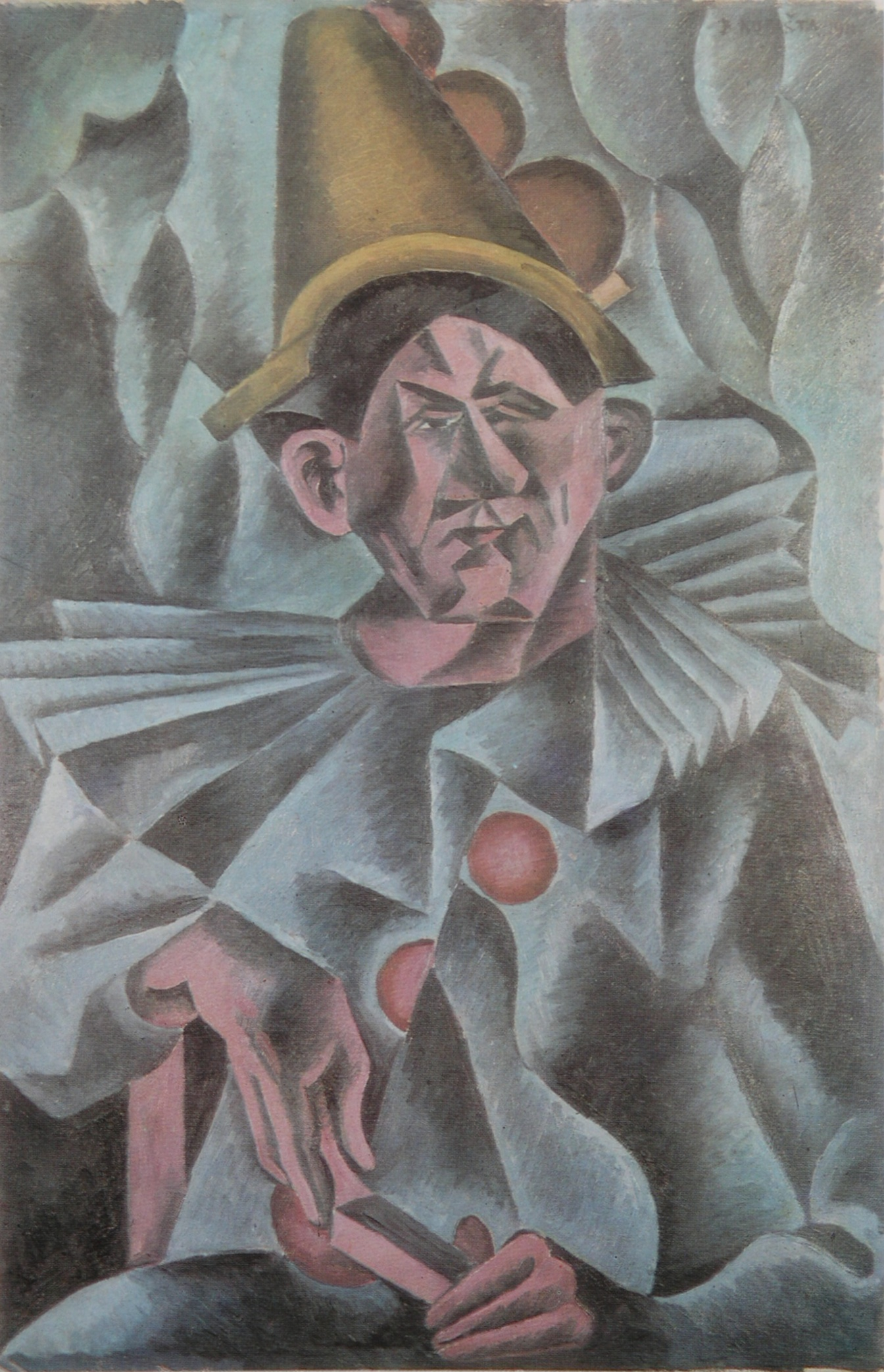 Pierot